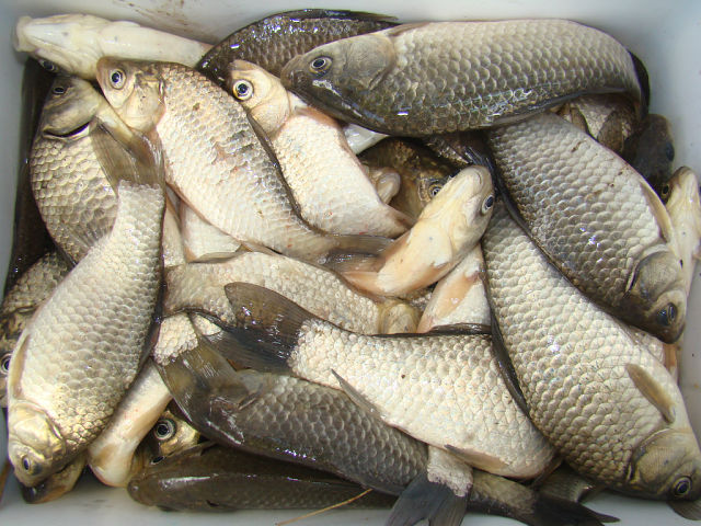 Рыба. Валуевка, Старополтавский район Волгоградской области